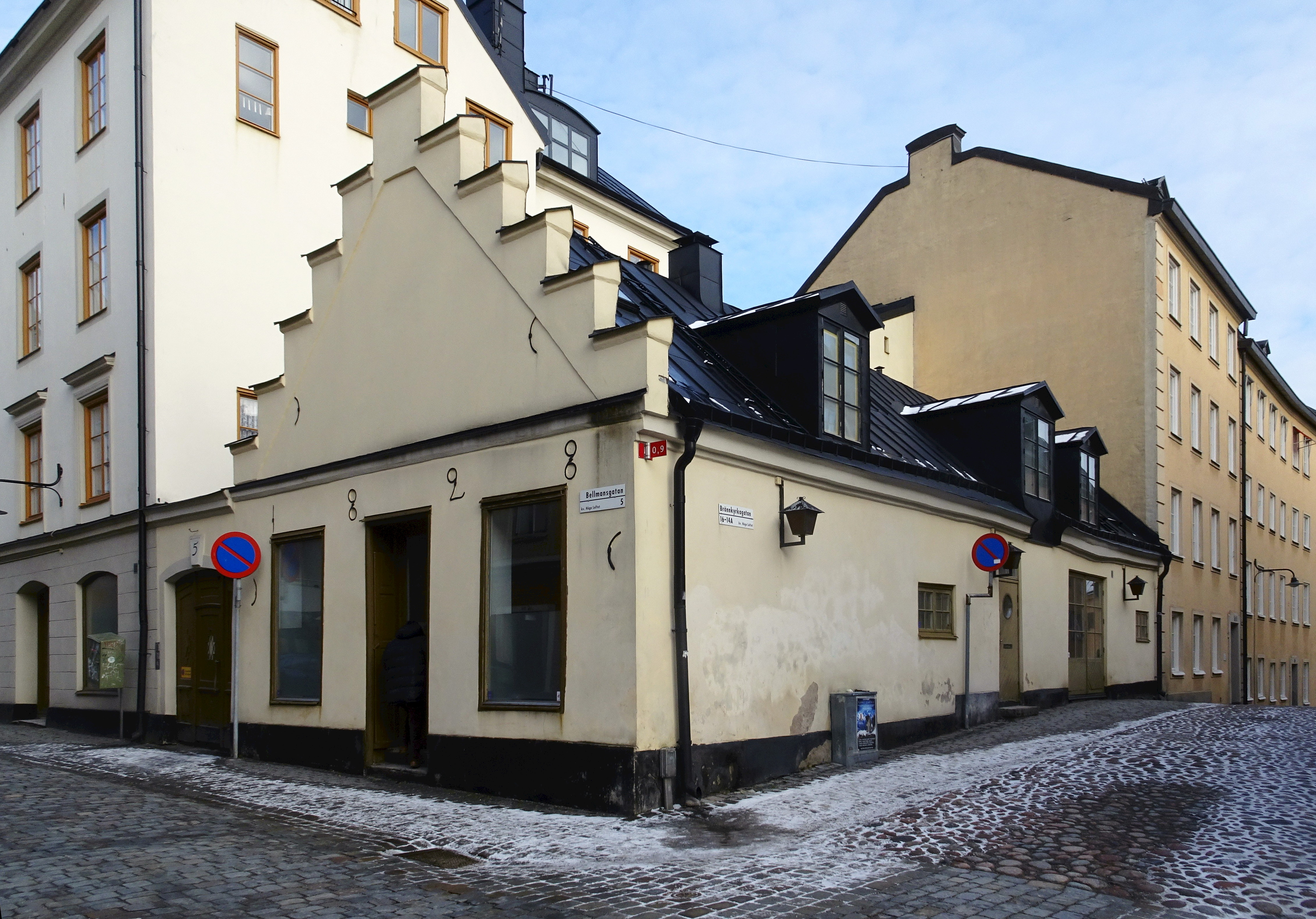 Bellmansgatan 5 / Brännkyrkagatan 16, byggd 1828 av Thomas Aspelin som snusfabrik